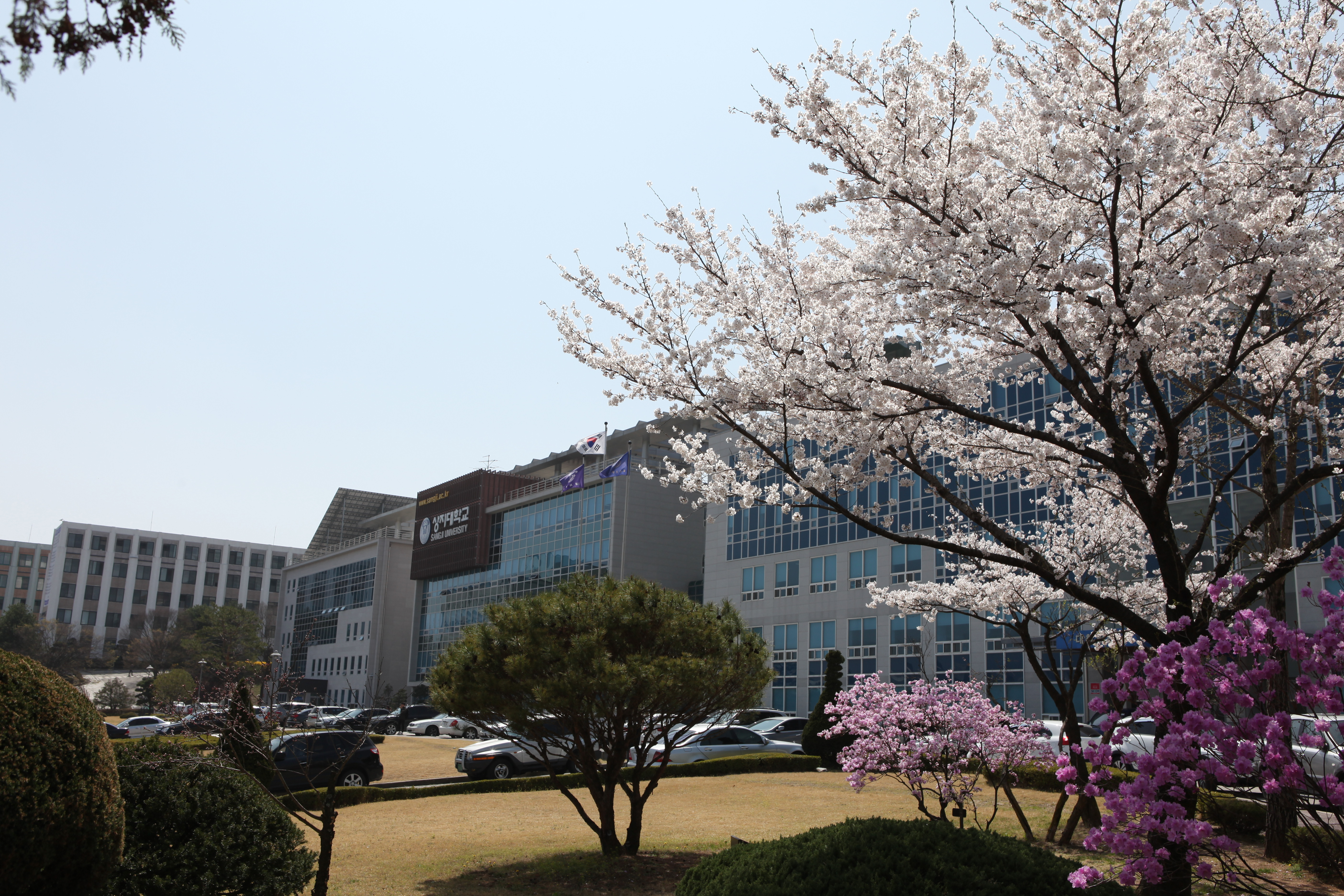 상지대 본관 봄2